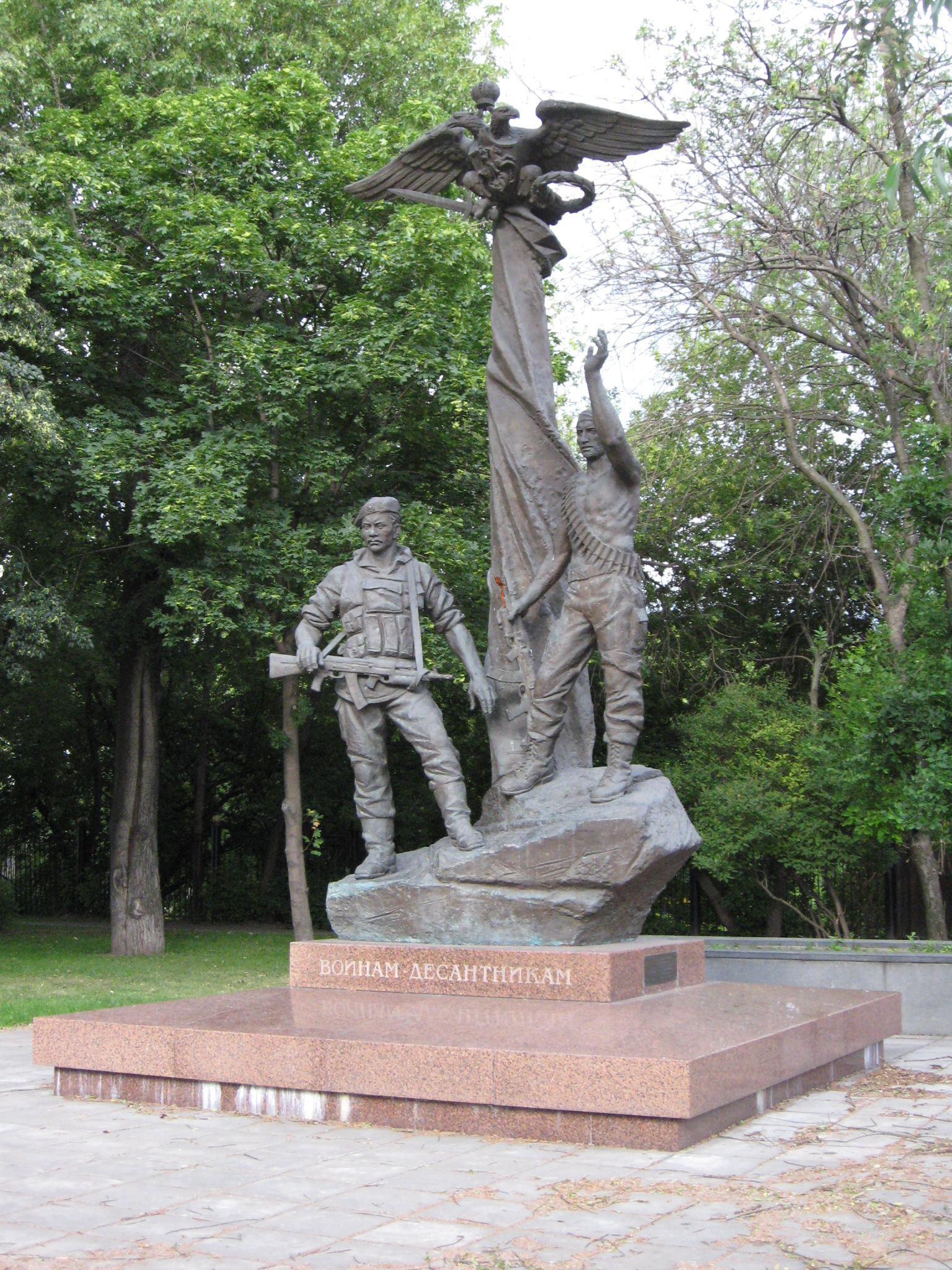 Памятник десантникам